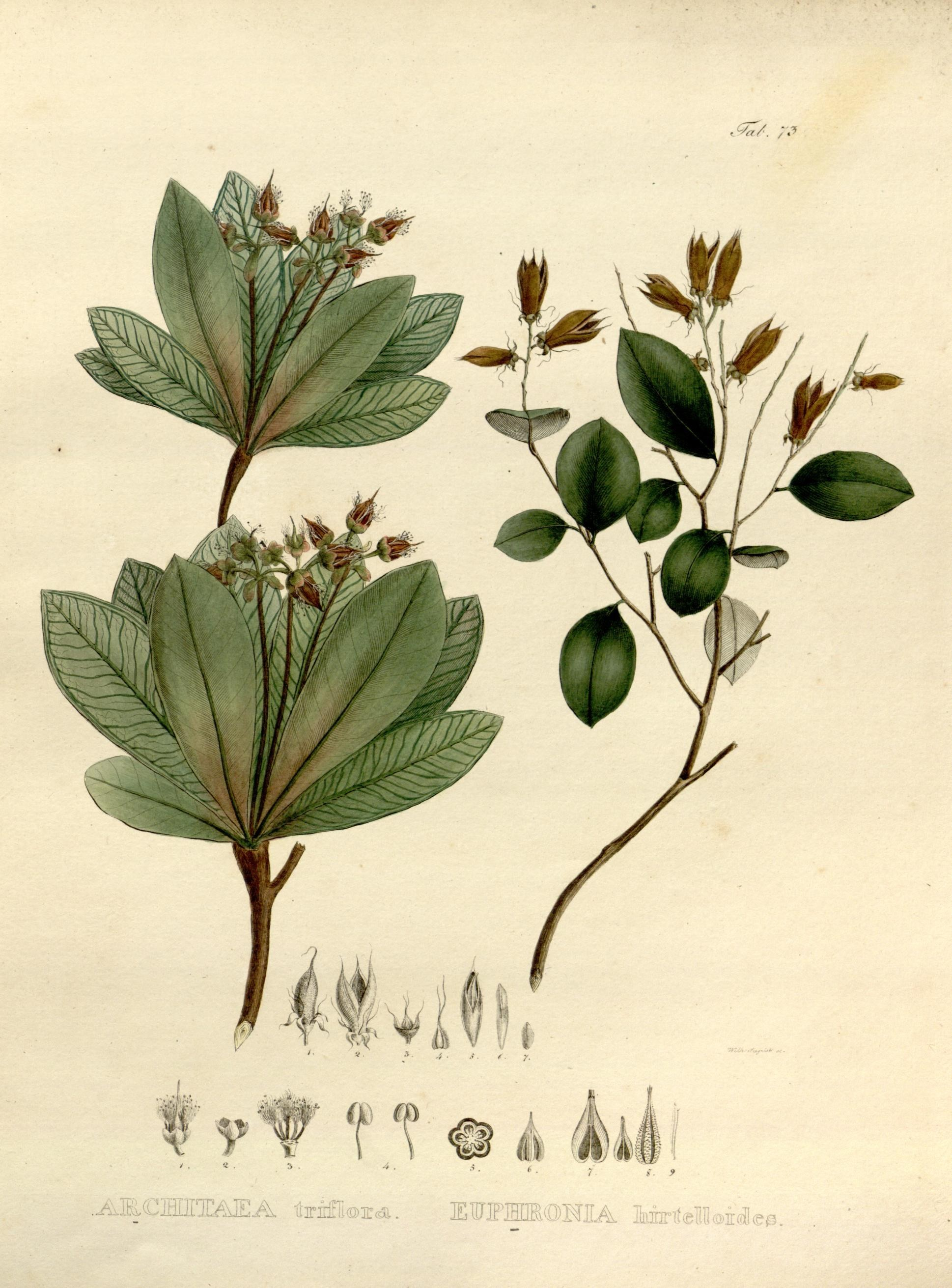 1. Architaea triflora = Archytaea triflora , 2. Euphronia hirtelloides Nova genera et species plantarum. Monachii [Munich] :Impensis Auctoris,1824-1829 [i.e. 1824-32]..